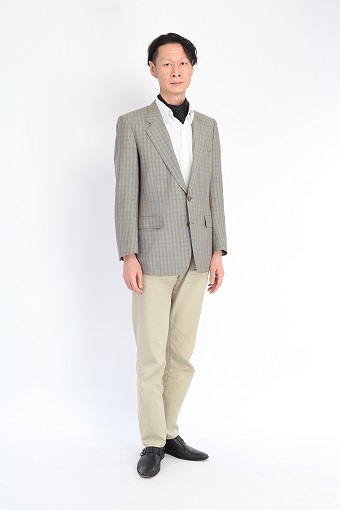 プロフィール